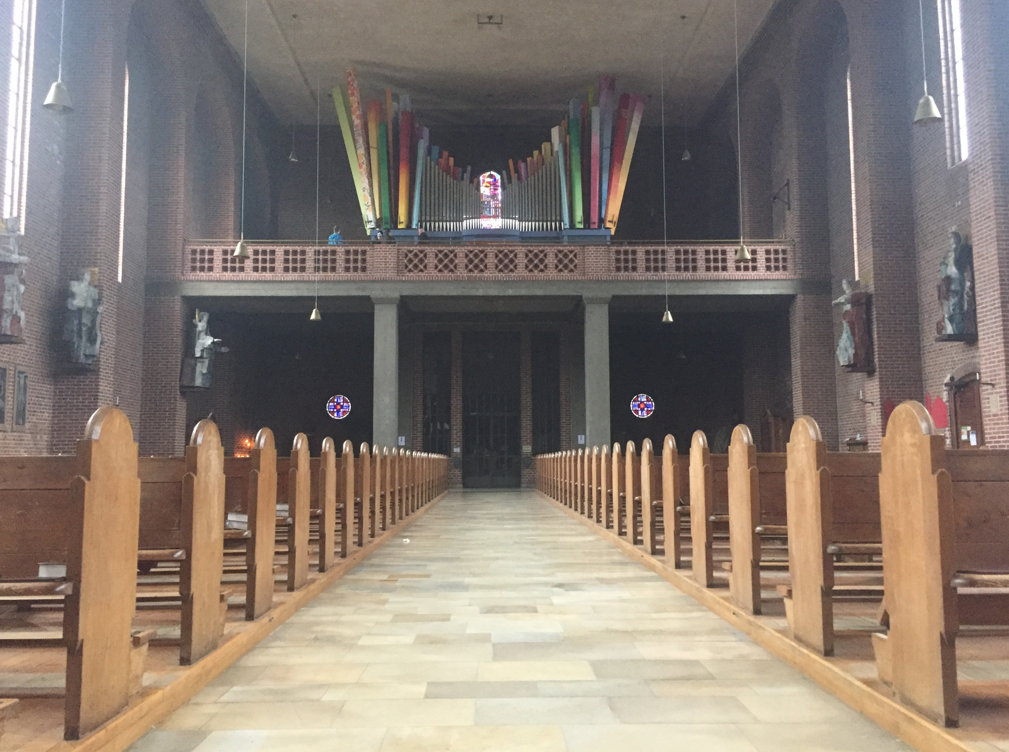 Die Kirche St. Elisabeth in Augsburg-Lechhausen, Blick zur Empore